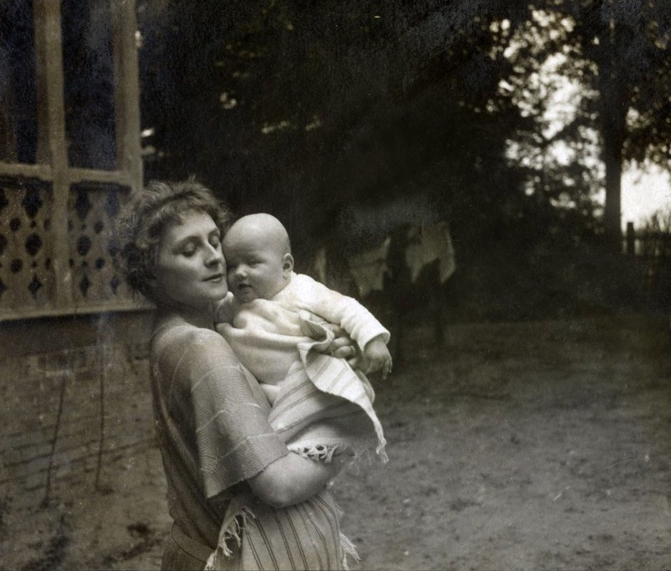 Anna Iwaszkiewiczowa z córka, willa Aida, Podkowa Leśna, 1924